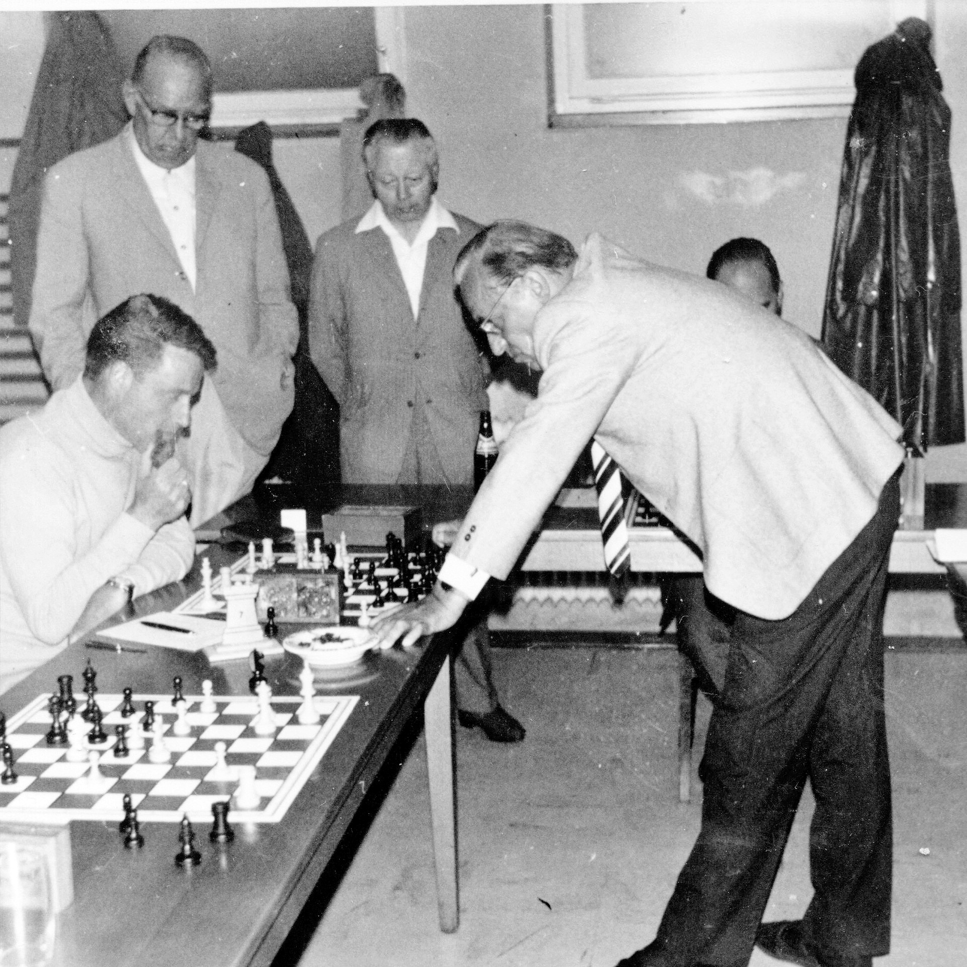 Simultanvorstellung von Theo Schuster, 1968 in Merzhausen. Vorn Hans Josef Cüppers und Theo Schuster, hinten Friedrich A. Stock und Eugen Kern.